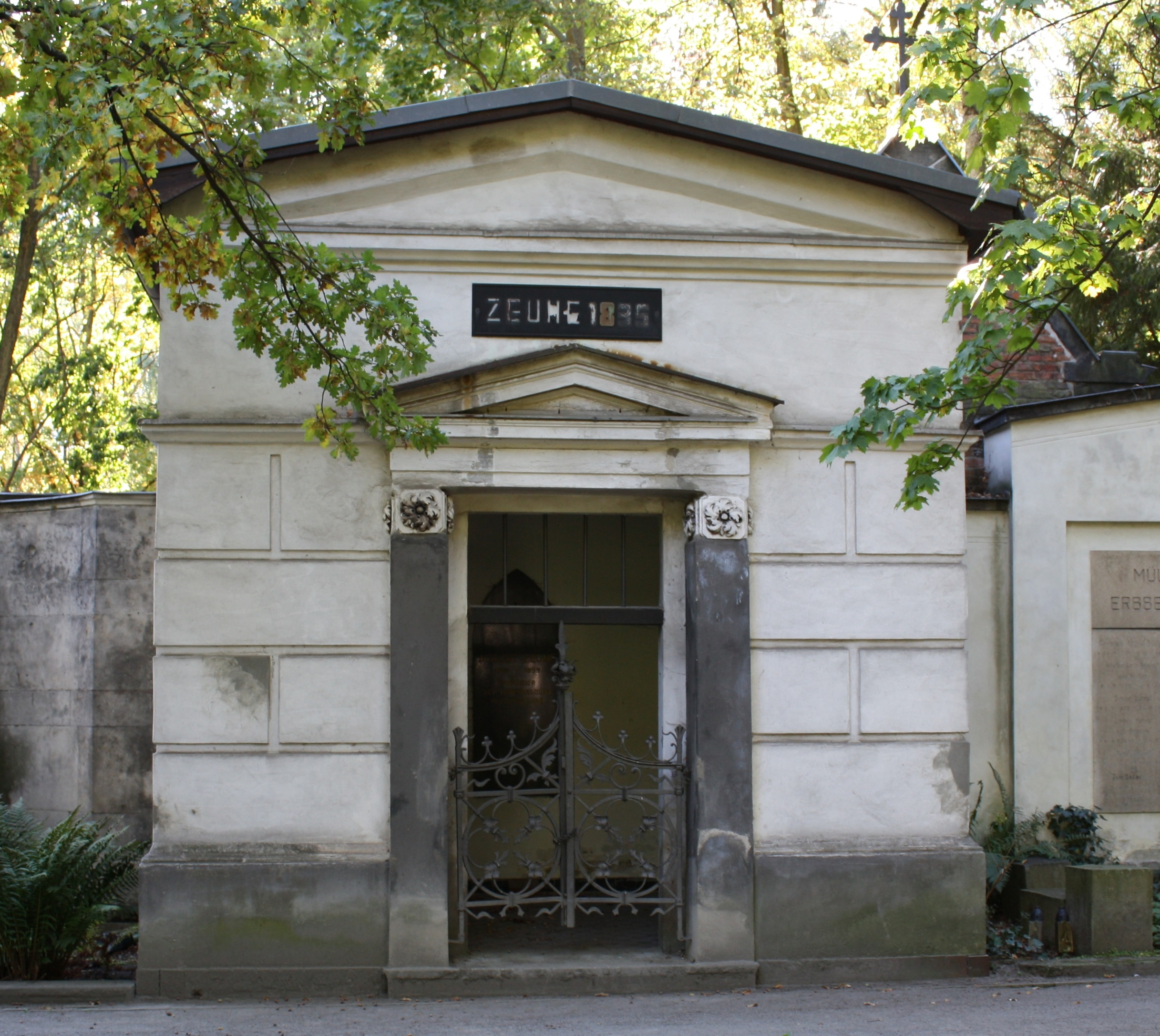 Grabmal Johann August Zeunes (1788-1853) auf dem Friedhof I der Georgen-Parochialgemeinde in Berlin, Greifswalder Straße.